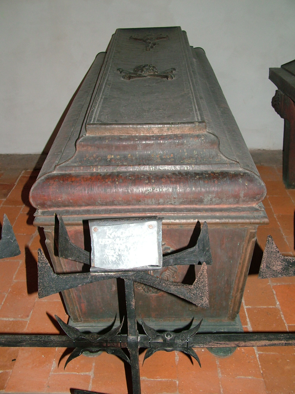 Grab des Bischofs Leopold Ernst von Firmian in Passau